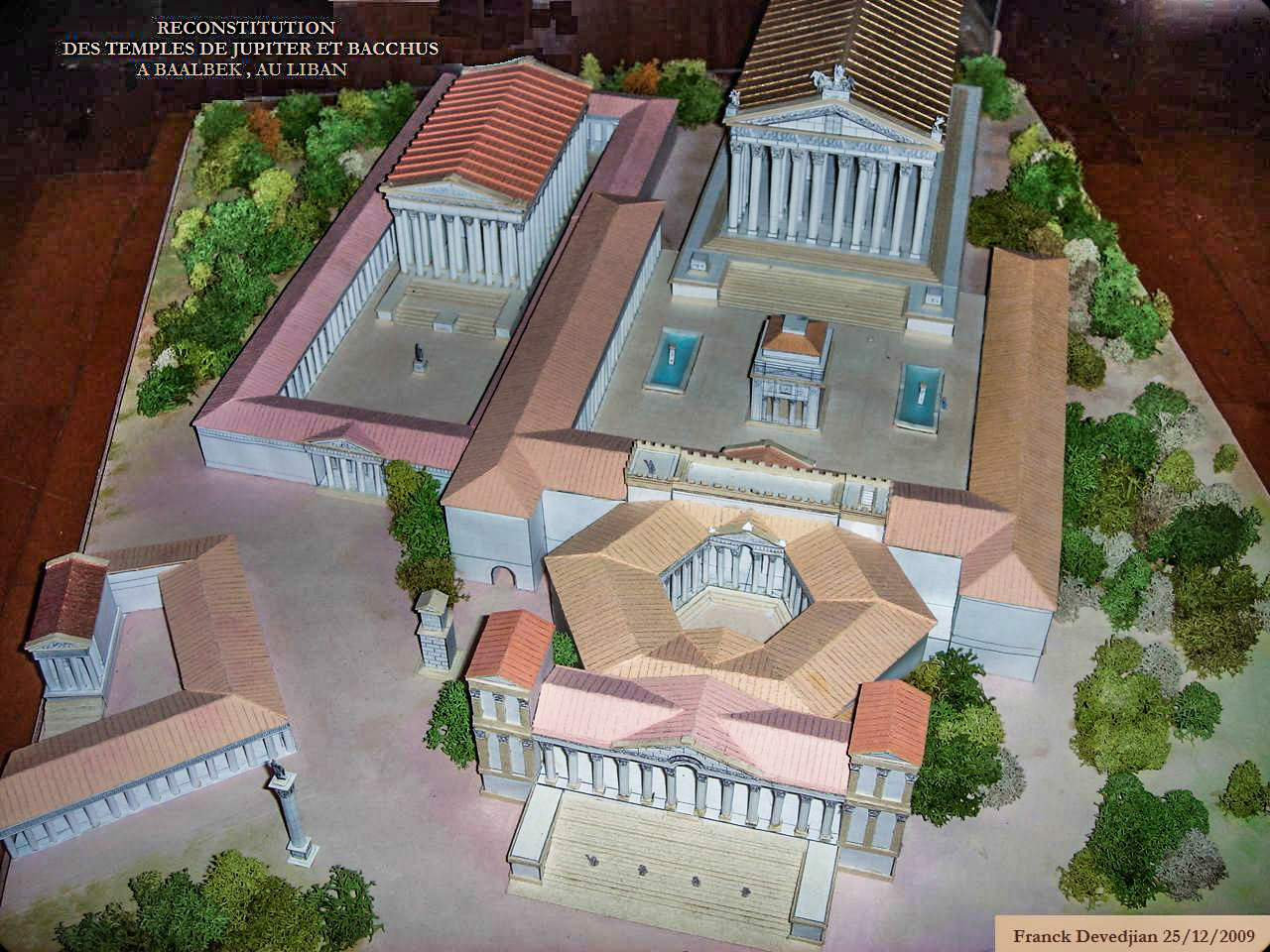 Description Reconstitution du sanctuaire de Baalbek au temps de sa splendeur Date25 December 2009Sourcesource personnelle à l'auteurAuthorFranck Devedjian né le 12 août 1981 à Clamart (France) mail : franckdevedjian(at)hotmail(pt)com Reconstitution du sanctuaire de Baalbek au temps de sa splendeur